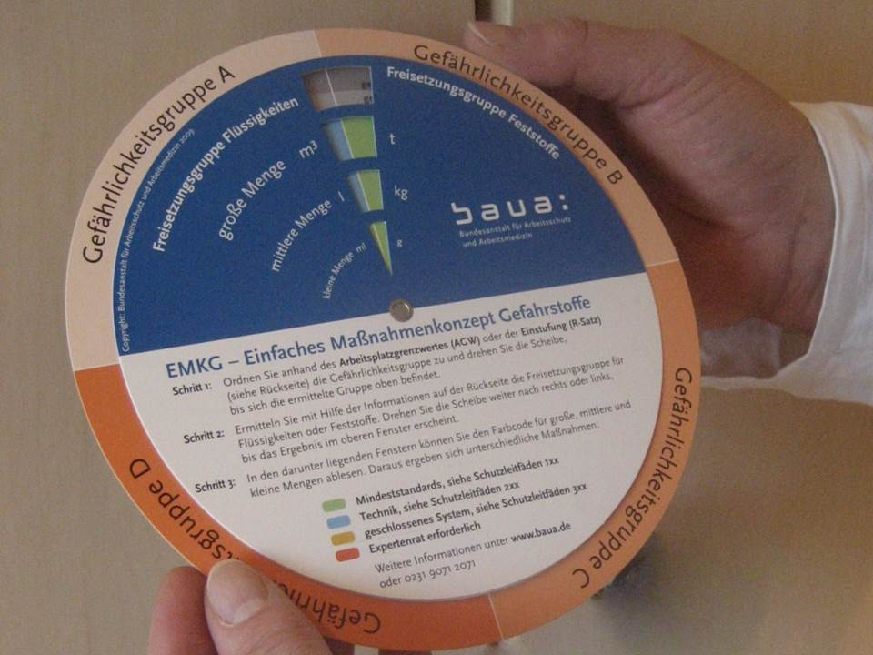 Taschenscheibe zur Abschätzung der Schadstoffbelastung (Exposition) im beruflichen Umfeld